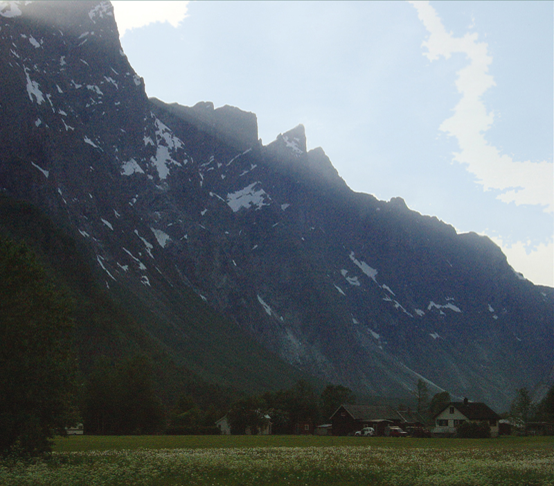 Rauma, from Marstein